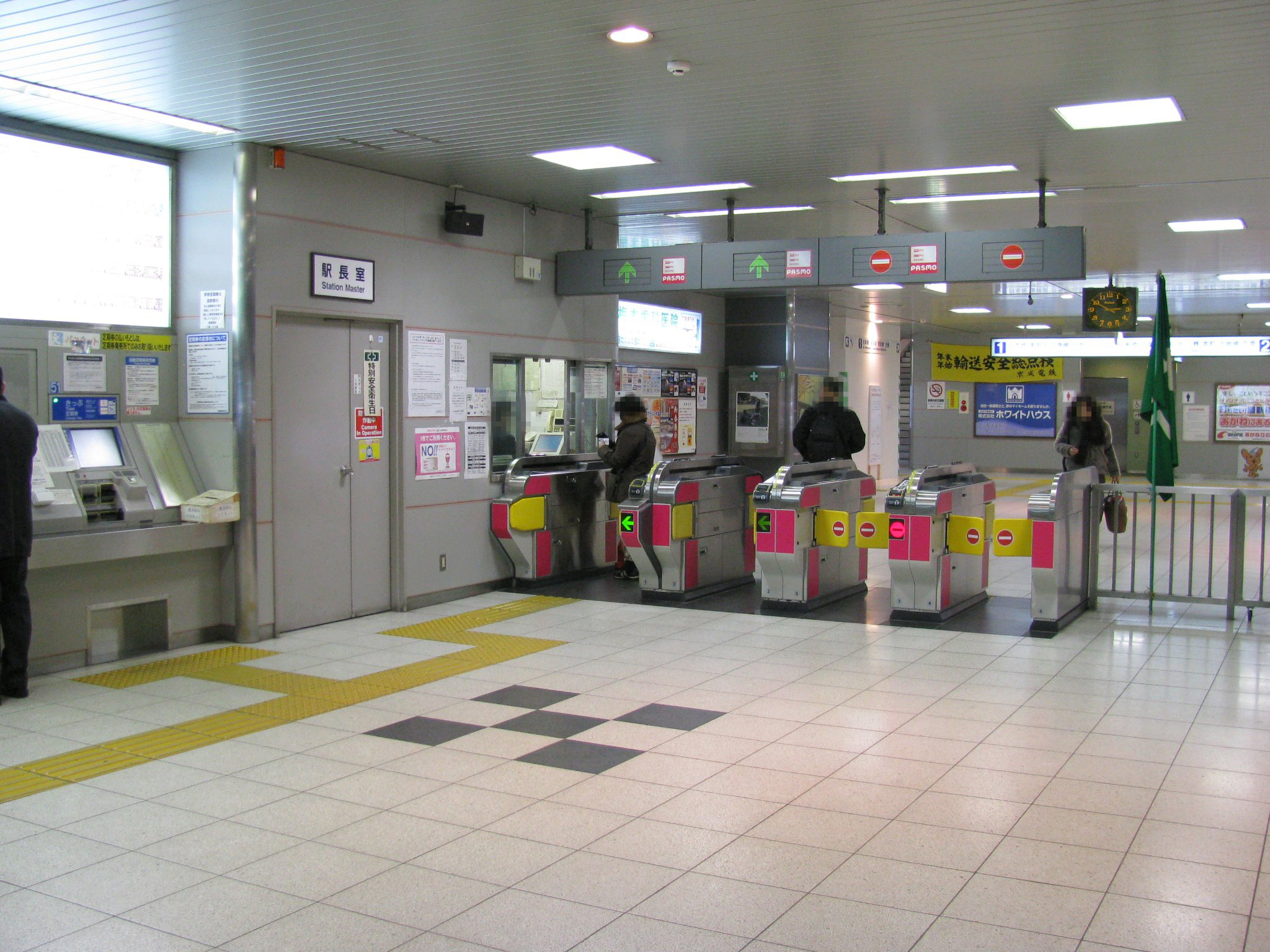 京成電鉄四ツ木駅